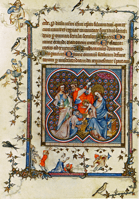 Hodinky Jany Navarrské